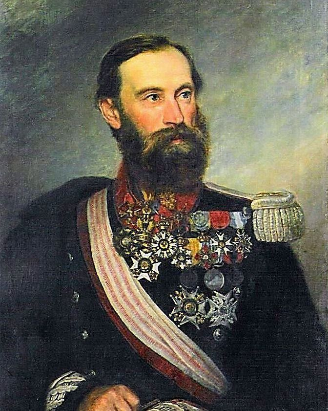 Gemälde Felix von Schumacher (Privatbesitz)